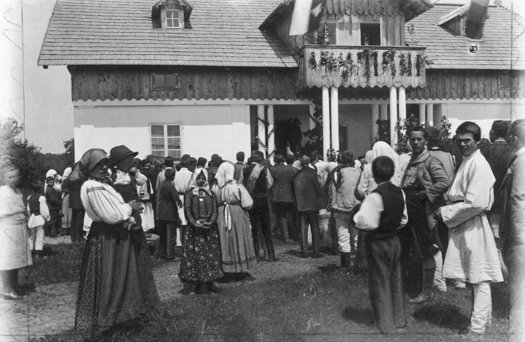 Polscy mieszkańcy wsi Baniłów nad Seretem na Bukowinie w Rumunii (r. 1923) obecnie na Ukrainie